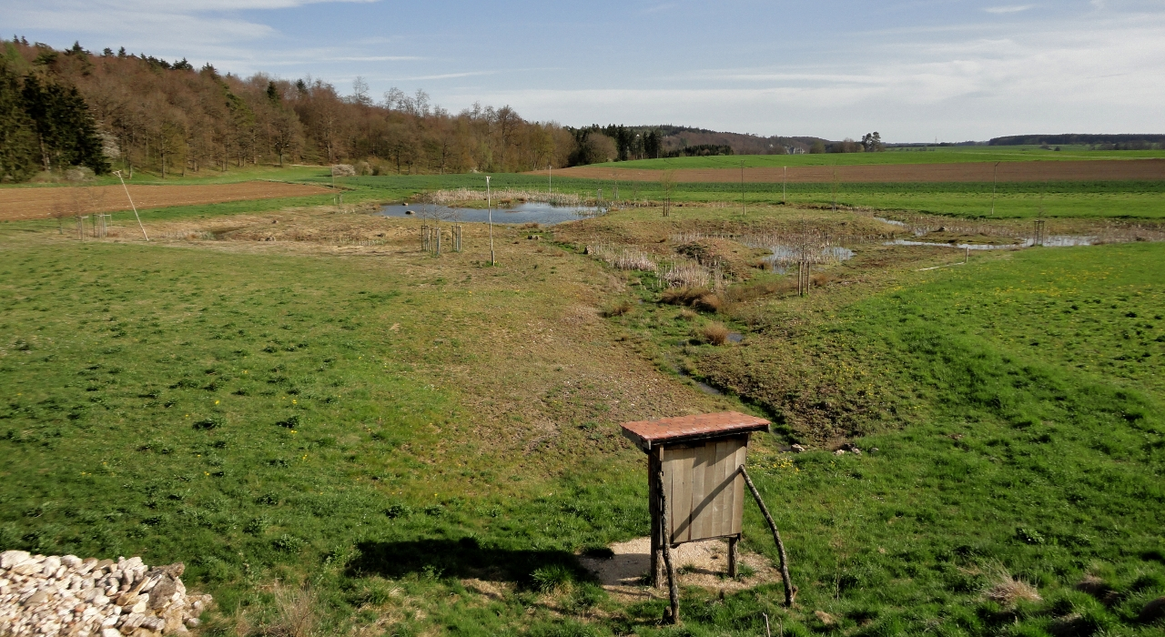 Das 2010 hergerichtete Binger „Biotop“ (formell kein Naturschutzgebiet ö.ä.), gelegen etwa 1,2 km nordöstlich vom Ortskern in Bingen (Landkreis Sigmaringen)